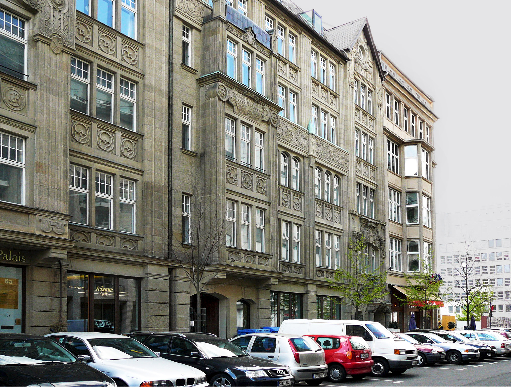 Mitte Schützenstraße 5 (rechts) und 6 ZIB heute